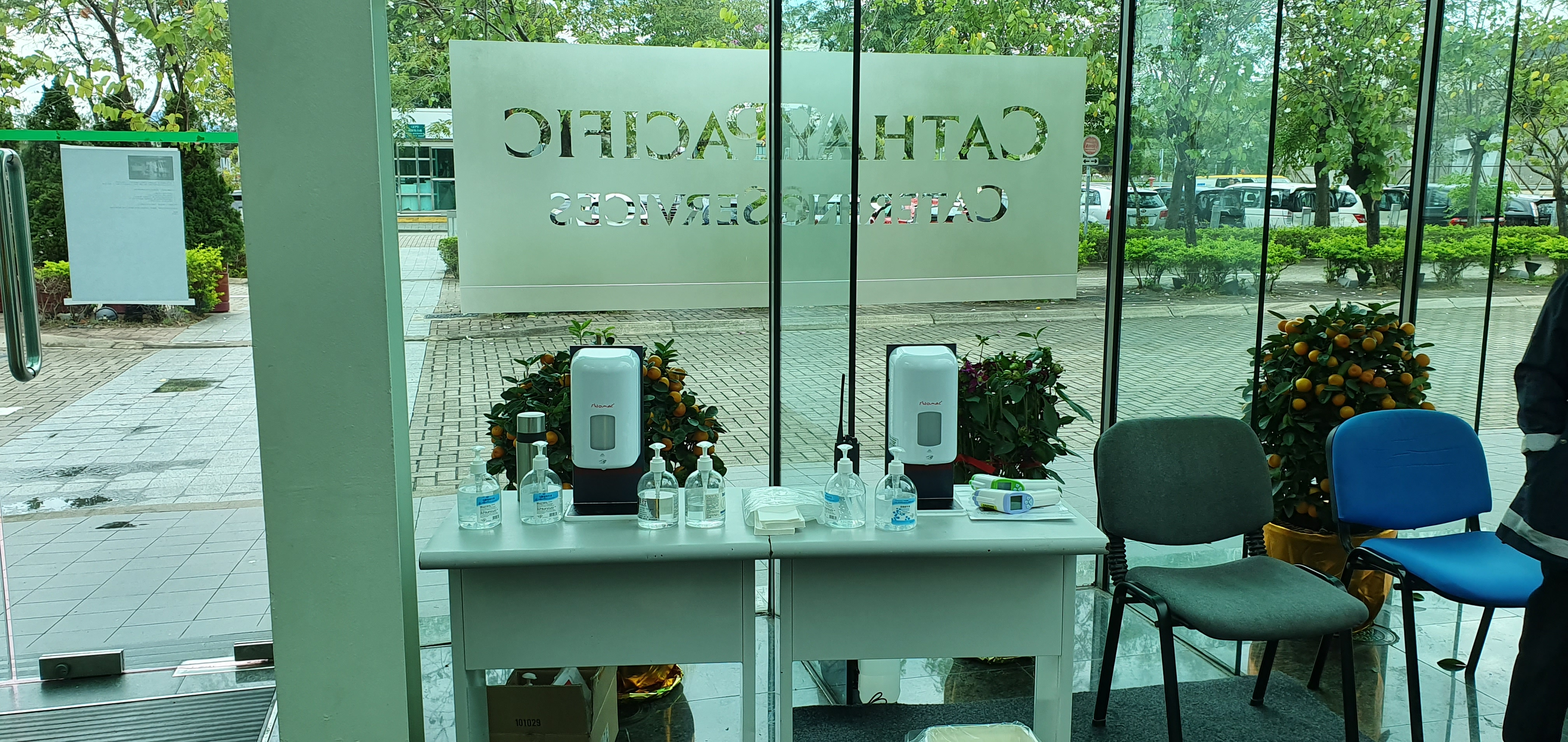 בידוק בריאות קת'אי